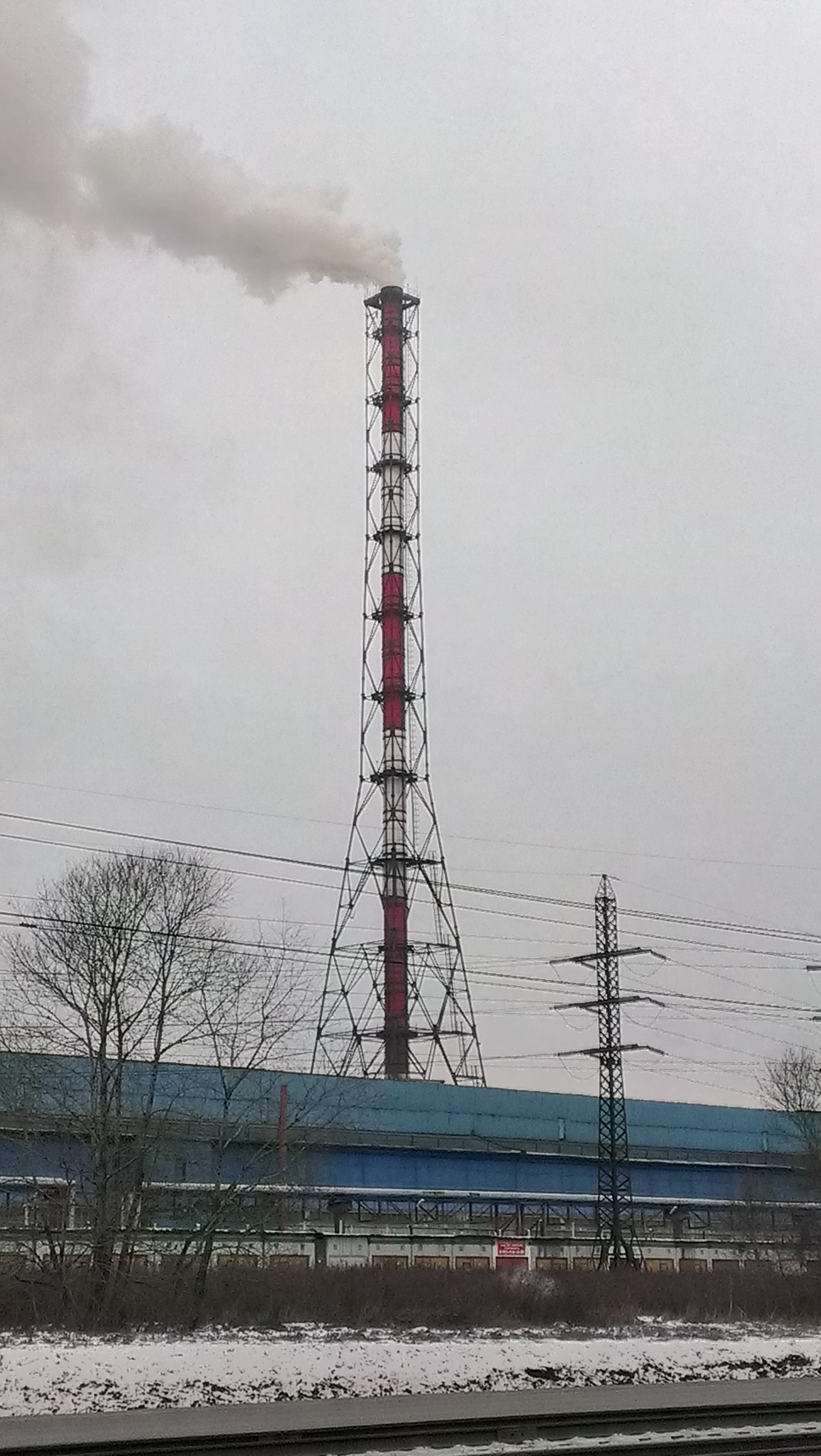 Kuznetskiy rayon, Novokuznetsk, Kemerovskaya oblast', Russia